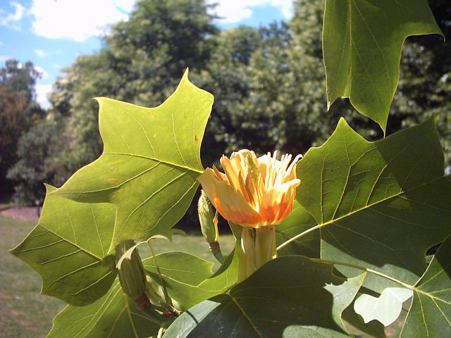 Kew Gardens (London, England): Tulpenbaumblüte